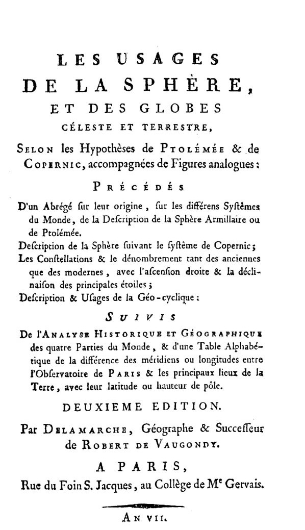 Frontespizio